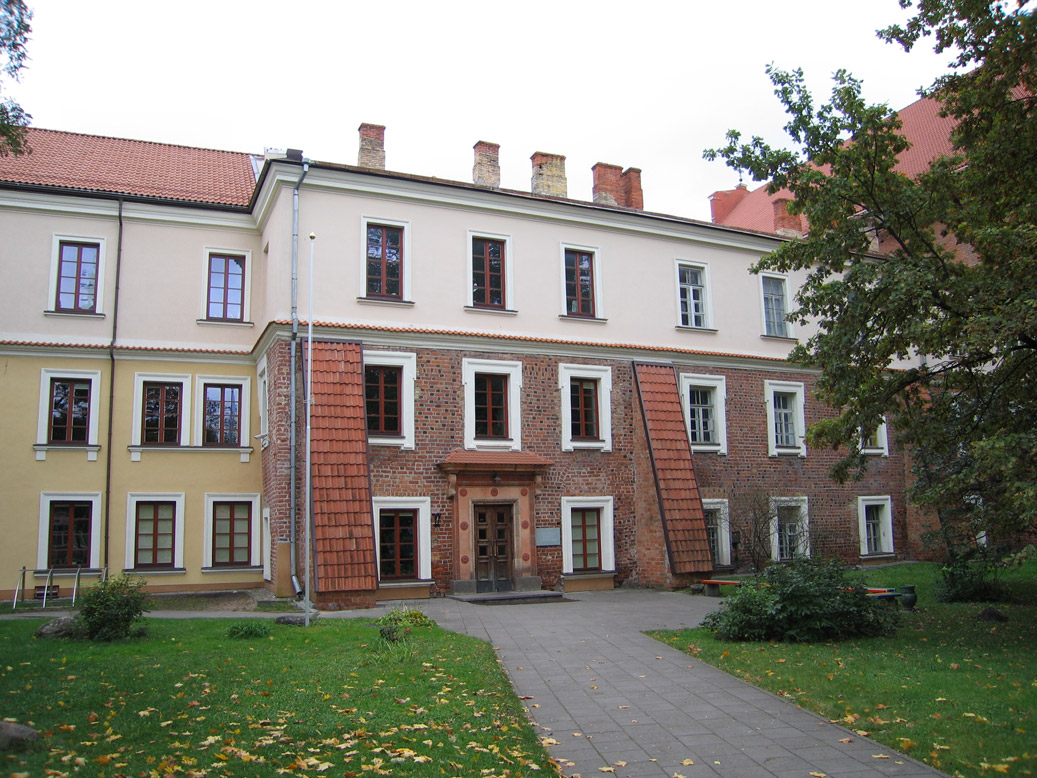 Vilnius Art Academy